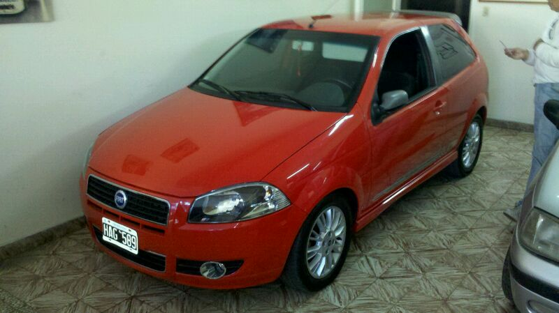 Fiat Palio 1.8R rojo en la Consecionaria